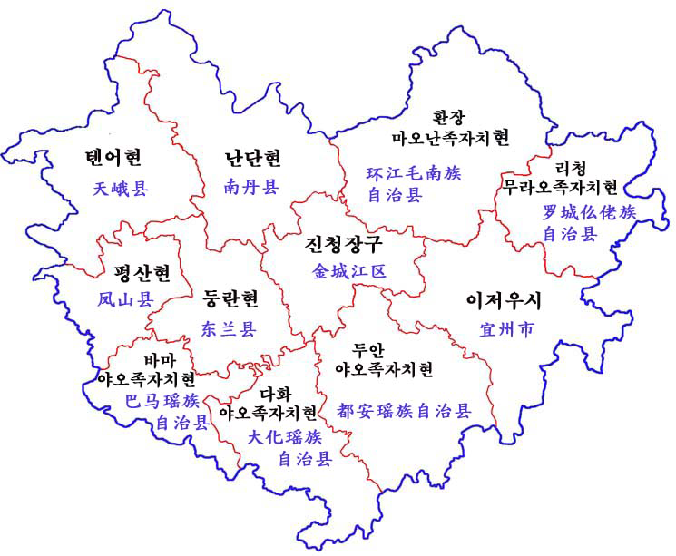 허츠시 현급행정구역